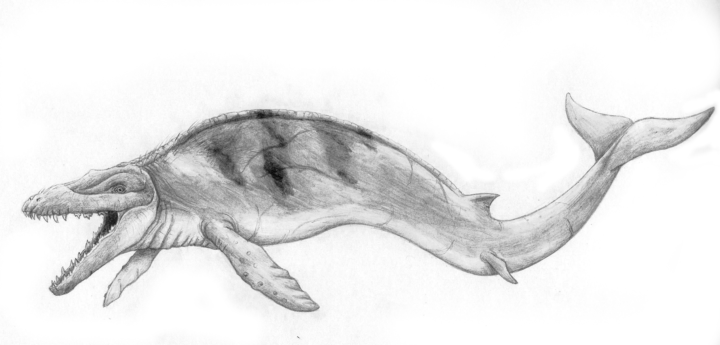 Basilosaurus sp.